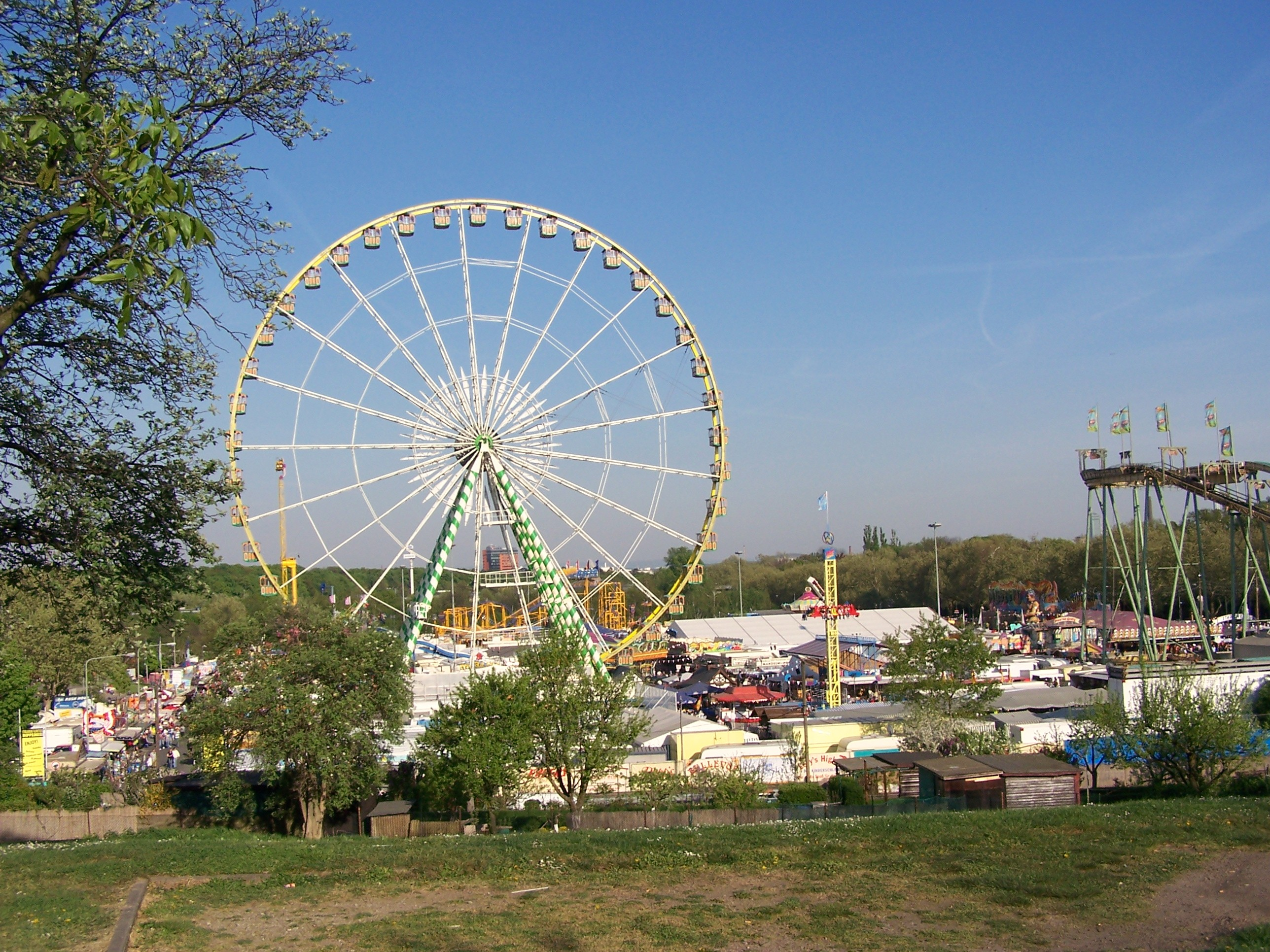 Frankfurter Dippemess auf dem Festplatz am Ratsweg. Foto-Standort: Bornheimer Hang